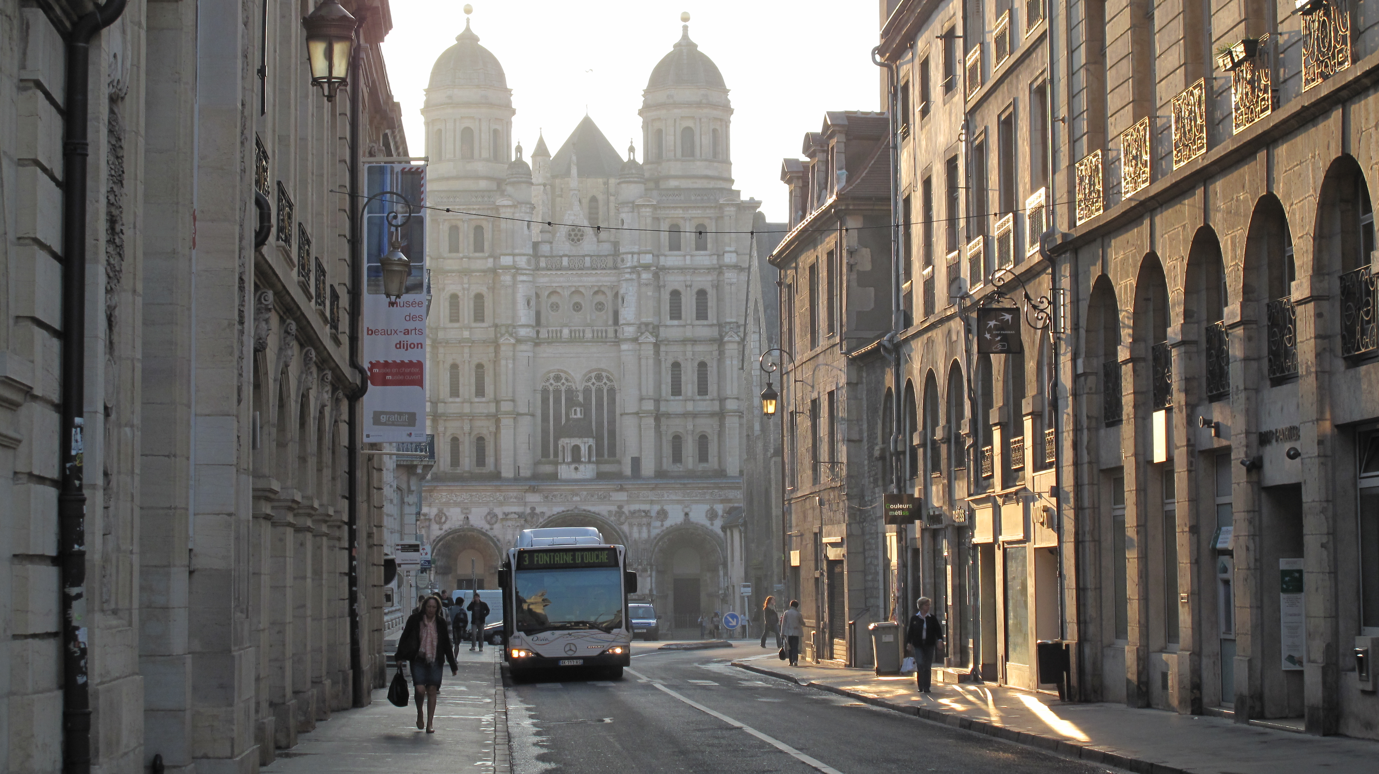 Eglise Saint-Michel - Ville de Dijon .